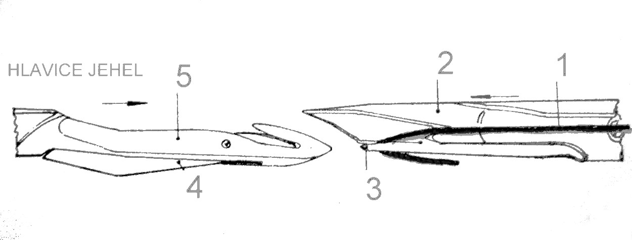 Greifer vor Schussfadenübergabe